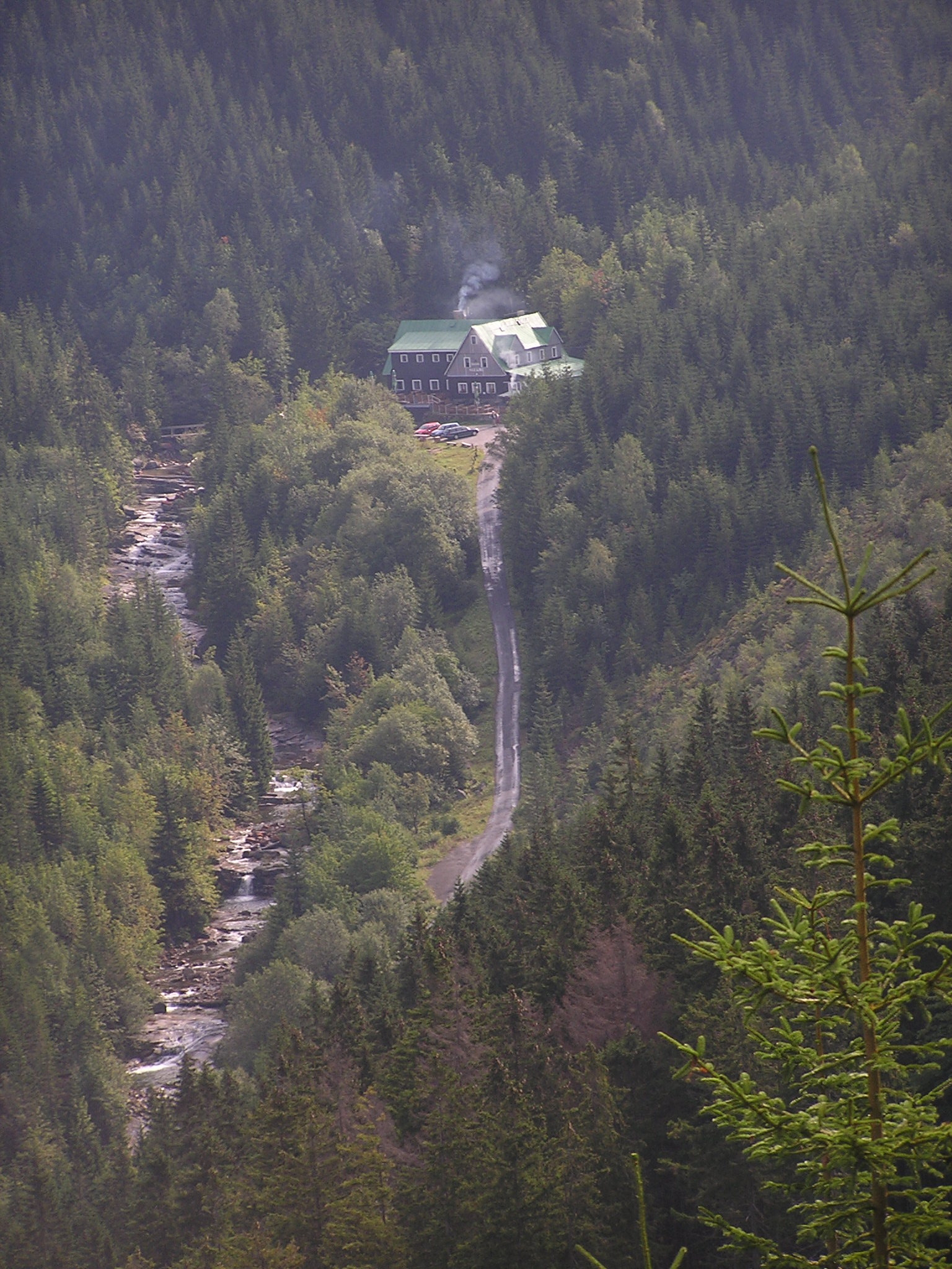 Bouda u Bílého Labe z Dřevařské cesty